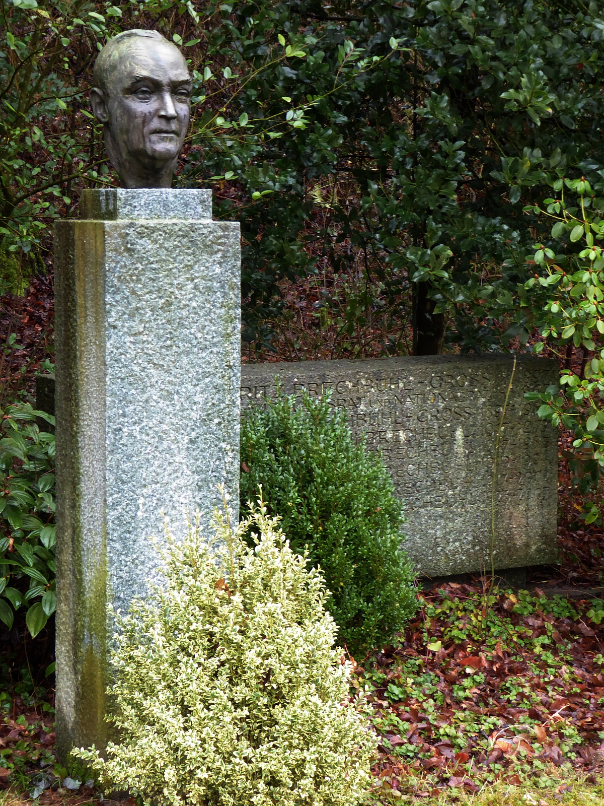 Fritz Brechbühl-Gross (1897–1963) Politiker, Familiengrab auf dem Friedhof Hörnli, Riehen, Basel-Stadt